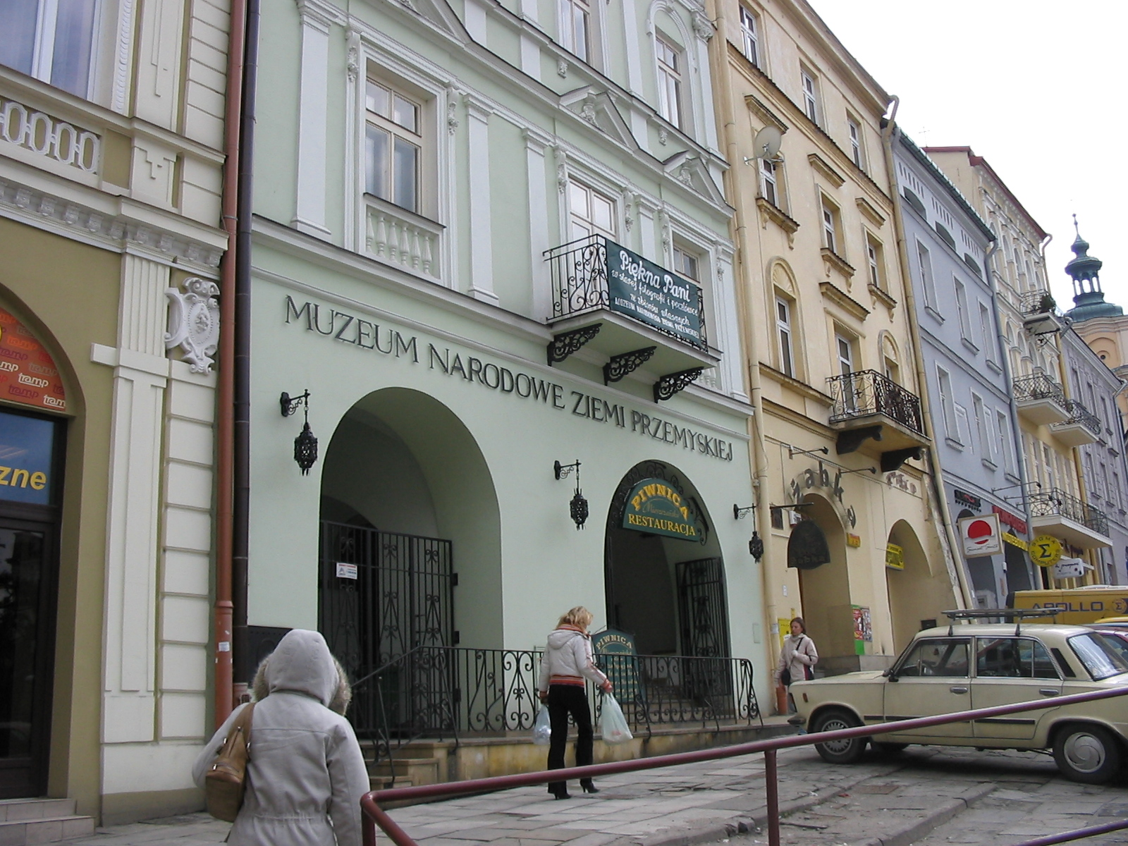 Przemyśl, Rynek 9 - dom, XVI/XVII